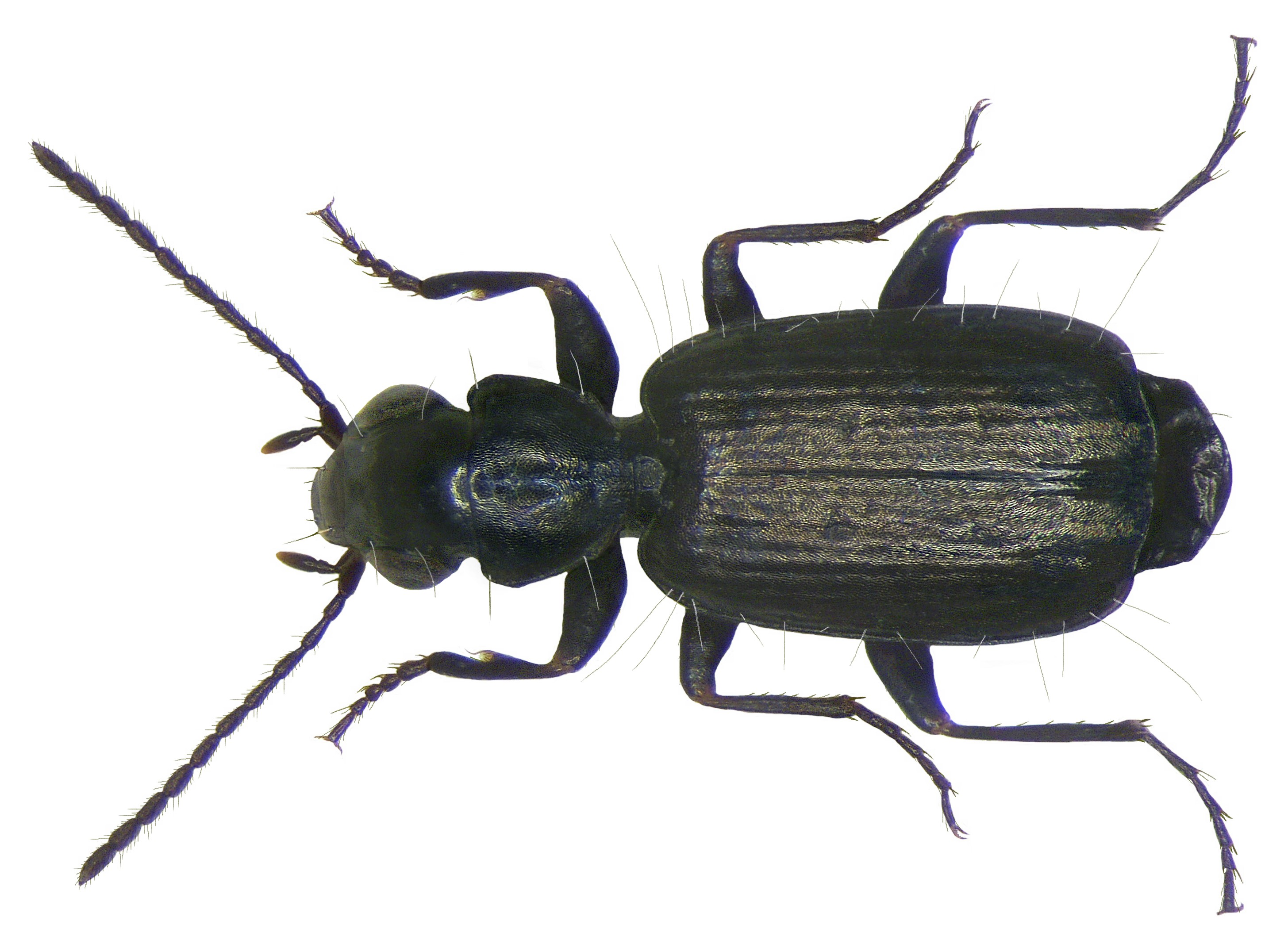 Familie: Carabidae Größe: 2,8-3,6 mm Verbreitung: Europa, Kaukasus bis Westsibirien Ökologie: in warmen, unbeschatteten Biotopen mit spärlicher Vegetation Fundort: Germania, Oberfranken, Kulmbach leg.det. U.Schmidt, 1984 Foto: U.Schmidt, 2008